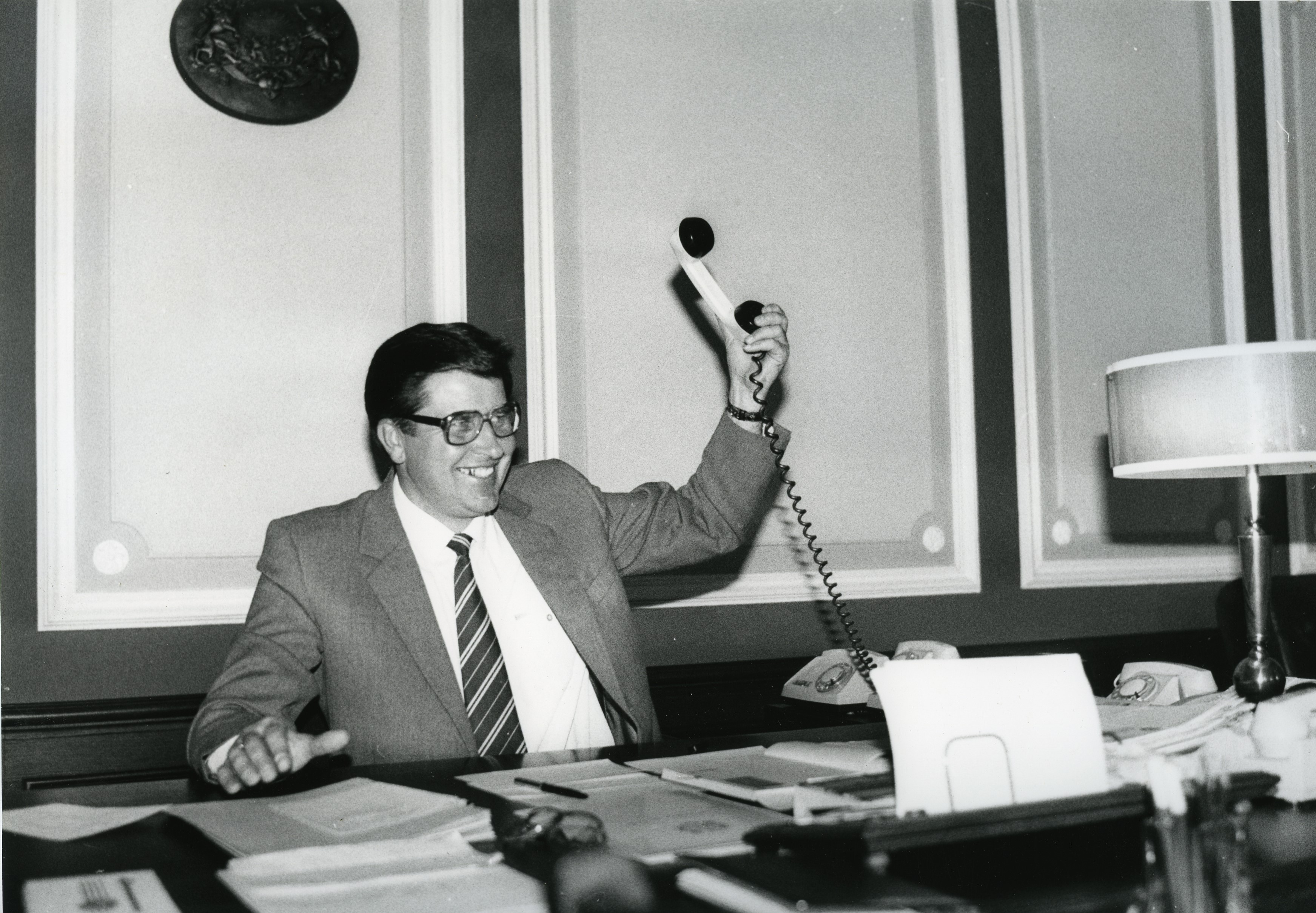 No Saeimas fotoarhīva: 02.09.1991. ASV atzīst Latvijas neatkarības atjaunošanu 2.septembris pirms 23 gadiem. ASV prezidents Džordžs Bušs sarunā ar Augstākās Padomes priekšsēdētāju Anatoliju Gorbunovu atzīst Latvijas neatkarības atjaunošanu. Atsaucoties uz konstitucionālā likuma „Par Latvijas Republikas valstisko statusu" pieņemšanu 1991.gada 21.augustā, citas valstis viena pēc otras sāka atzīt mūsu neatkarības atjaunošanu, konstatējot Latvijas atgriešanos starptautiskajā kopienā de facto.